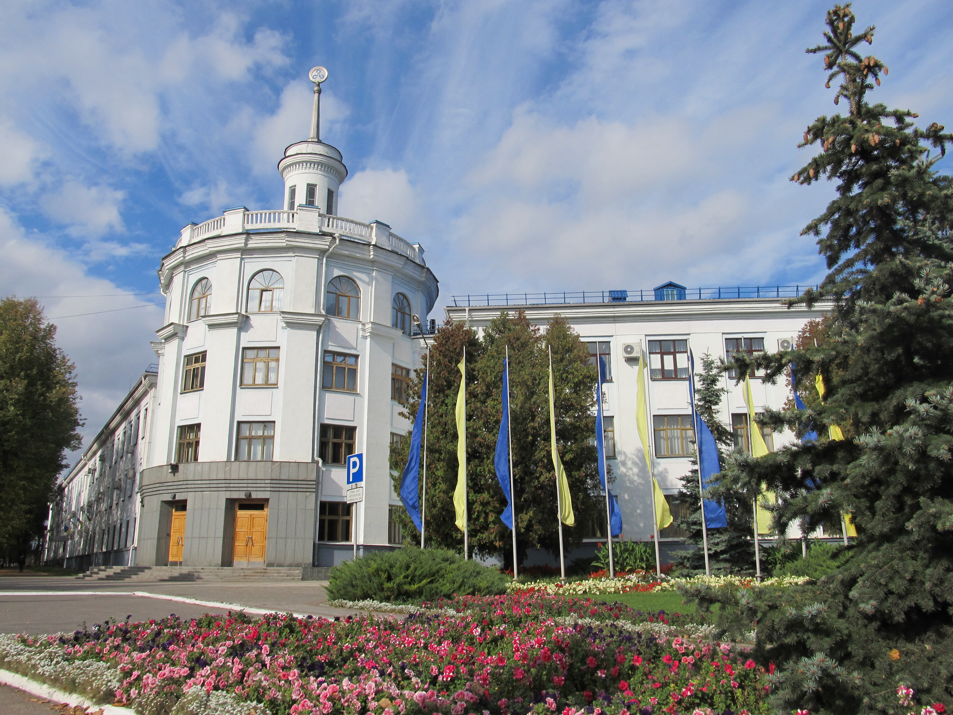 Машинобудівний завод Бельгійського акціонерного товариства “Сумські машинобудівні майстерні”